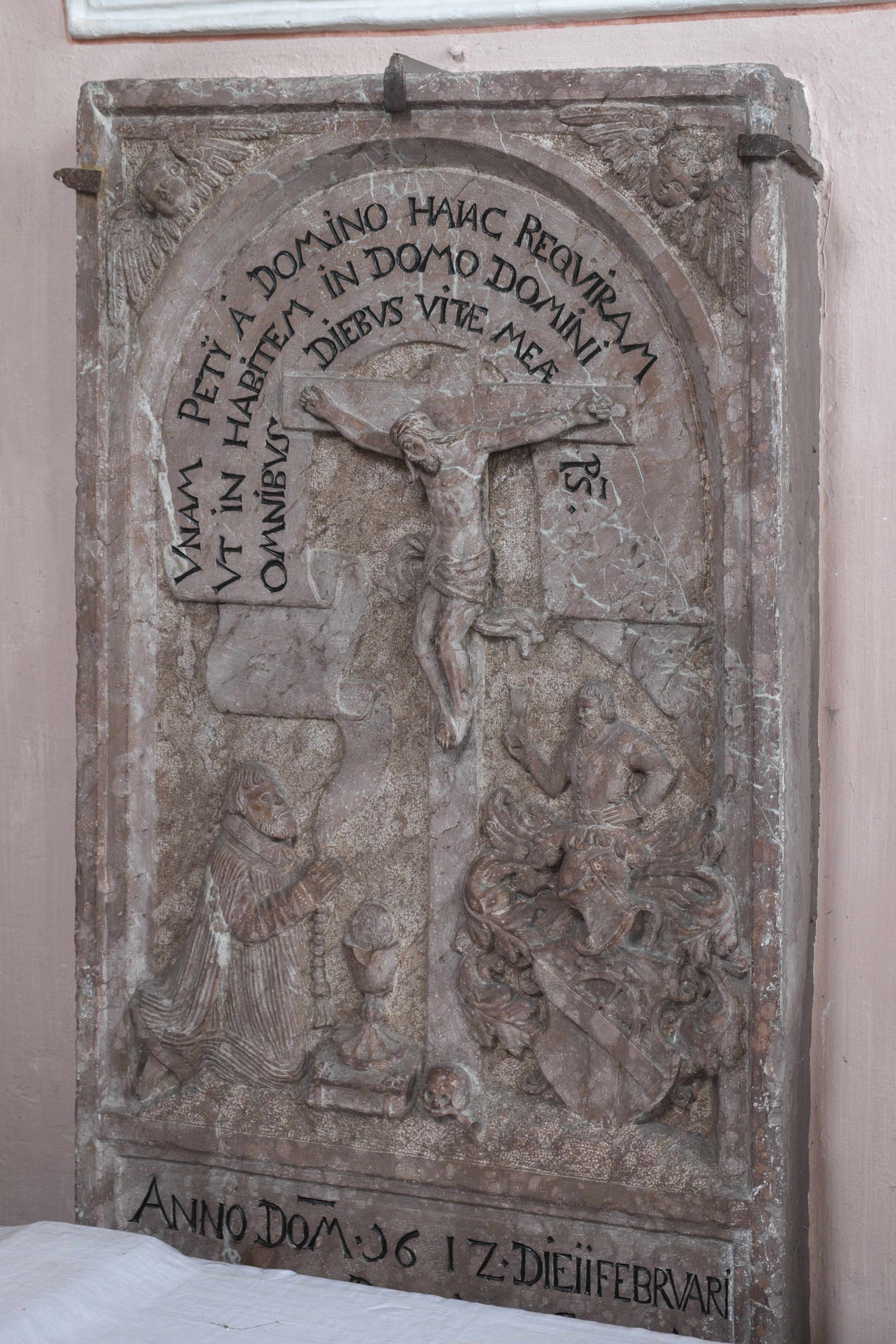 Katholische Pfarrkirche St. Andreas in Aying im Landkreis München (Bayern/Deutschland), Epitaph